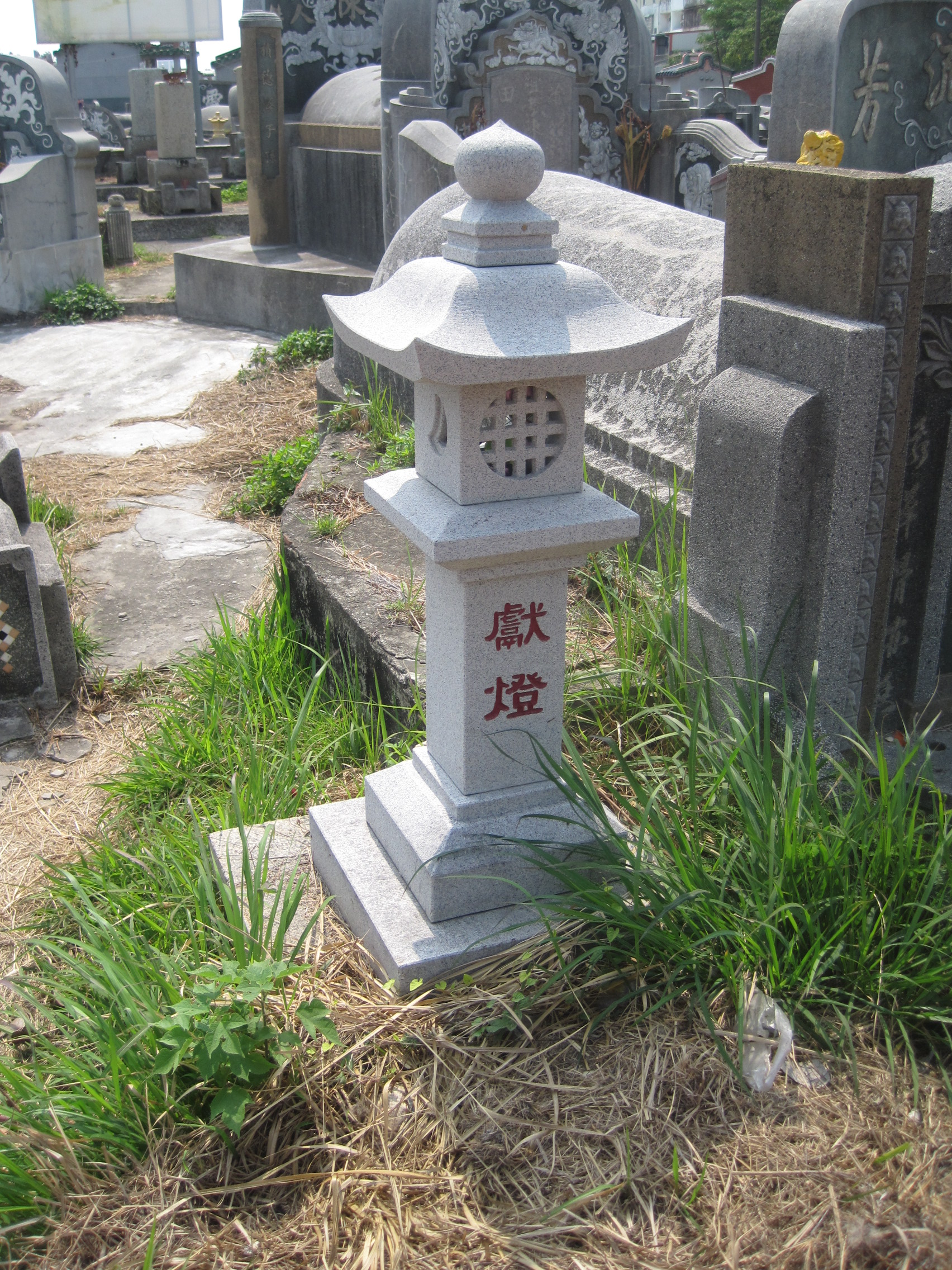 安平十二軍夫墓石燈籠